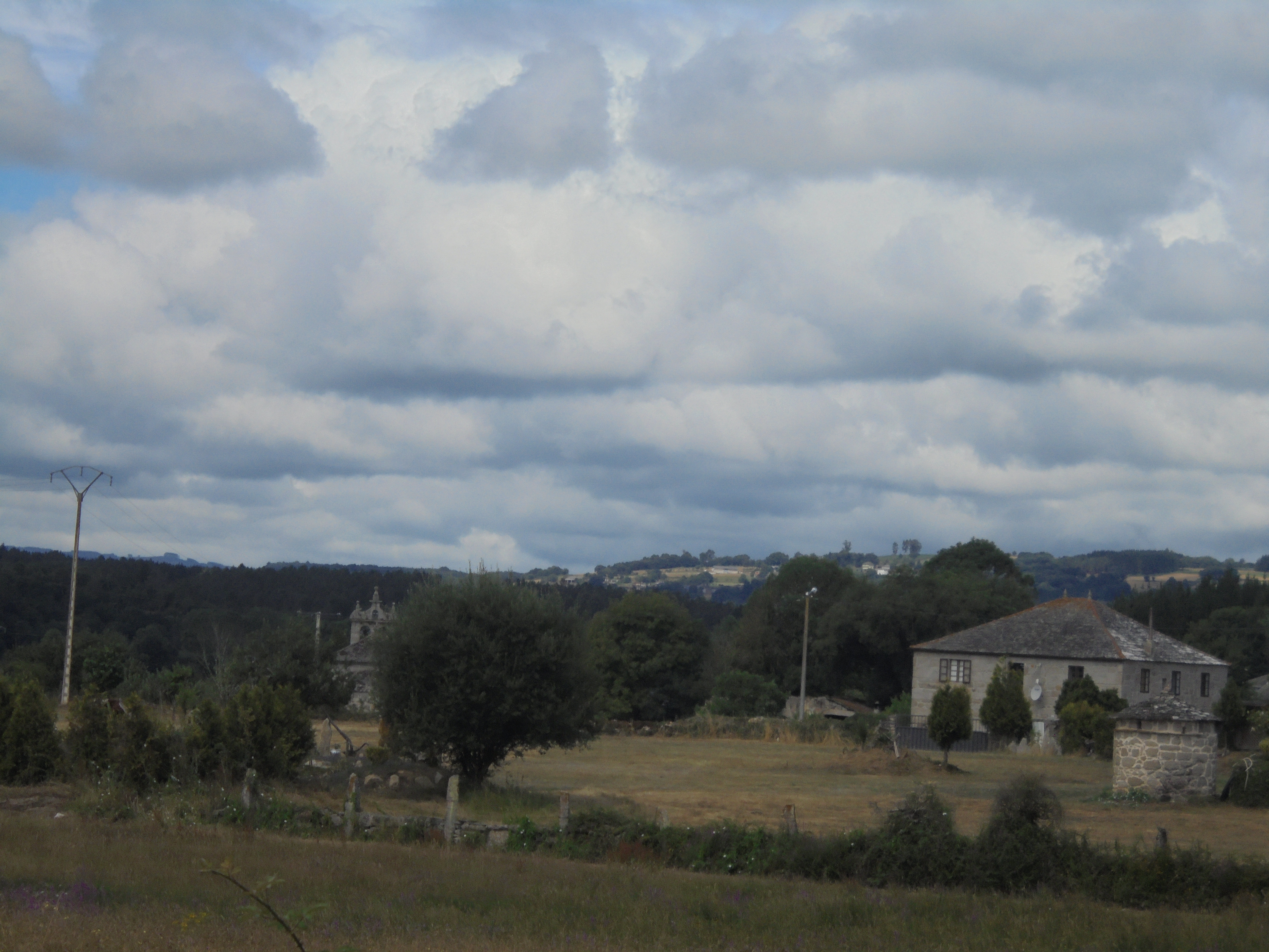 Vista de Cerceda ( O Corgo)